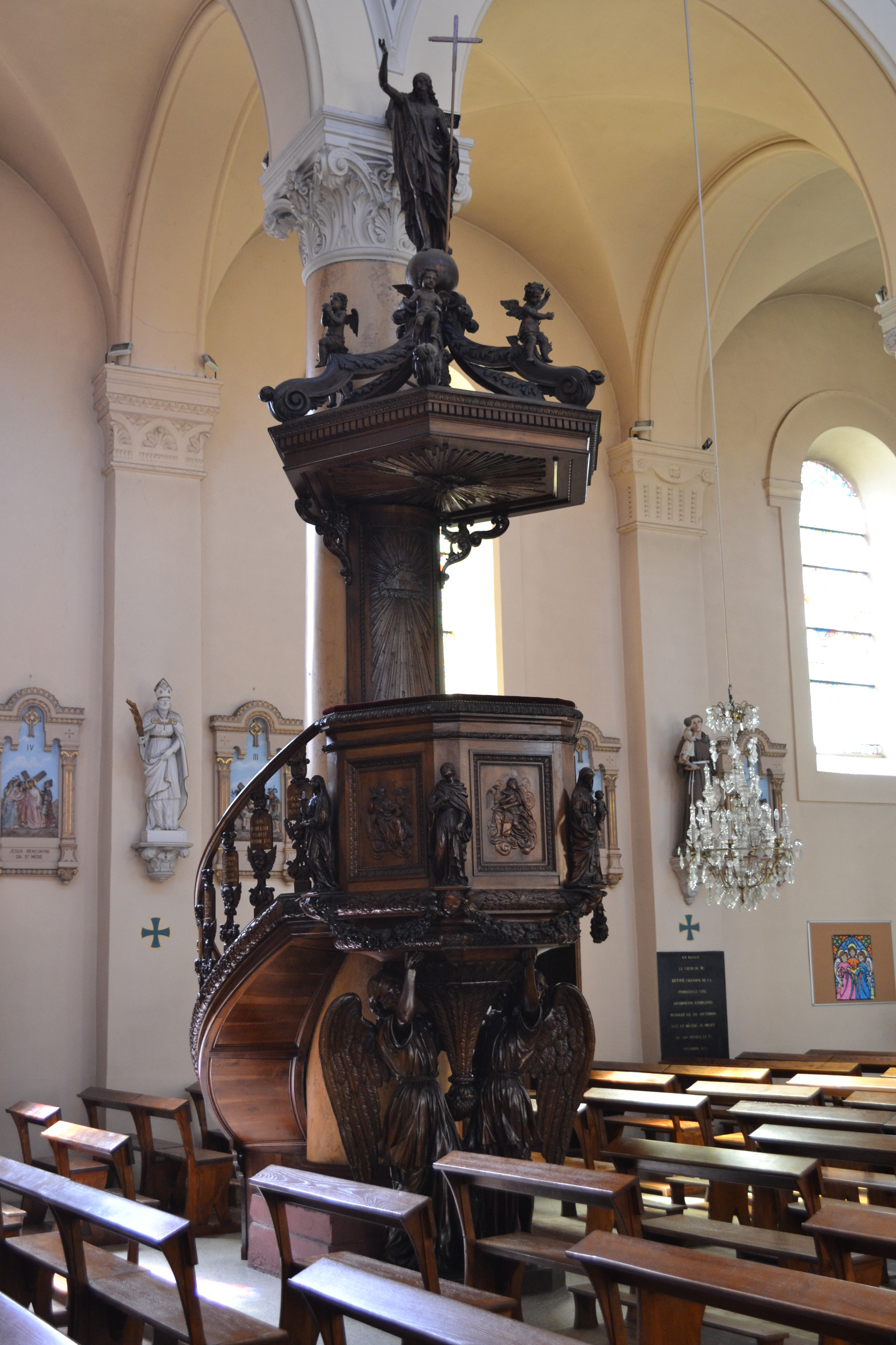 Chaire à prêcher de l'église Saint-Pothin d'Amplepuis, signée par le sculpteur Lyonnais André Erard, inaugurée le 8 décembre 1845, classée en janvier 1982 avec sur la rampe de l'escalier dix cartouches où sont gravées les dix commandements, sur la cuve hexagonales les évangélistes et Saint-Pothin, entre les panneaux quatre statuettes des vertus théologales. L'abat-son est surmonté d'angelots et des angelots et couronné par une sphère sommée d'une statue de saint Jean-Baptiste